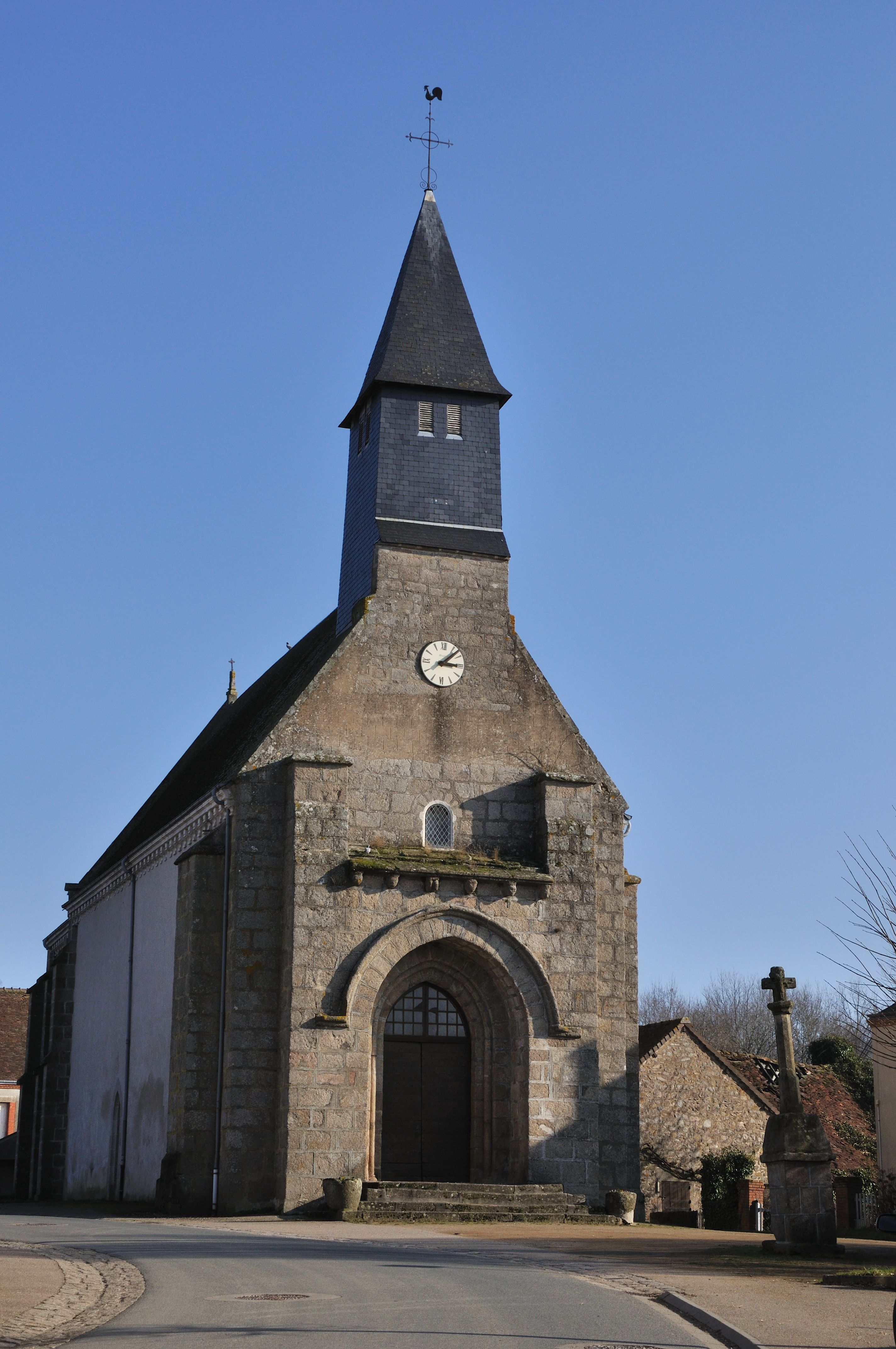 Saint-Plantaire (Indre) - Eglise